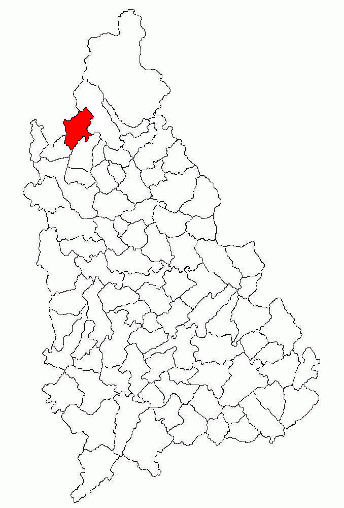 Această hartă are la bază harta judeţului Dâmboviţa realizată de Radufan. Categorie:Hărţi ale judeţului Dâmboviţa